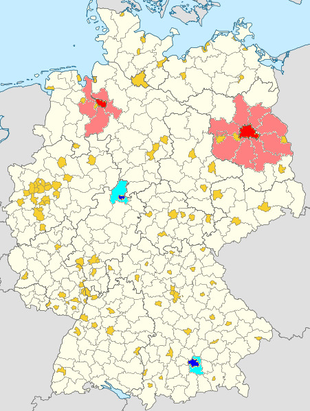 Sektoralkreise (rot) und Kragenkreise (blau) in Deutschland (in Orange: Kreisfreie Städte)